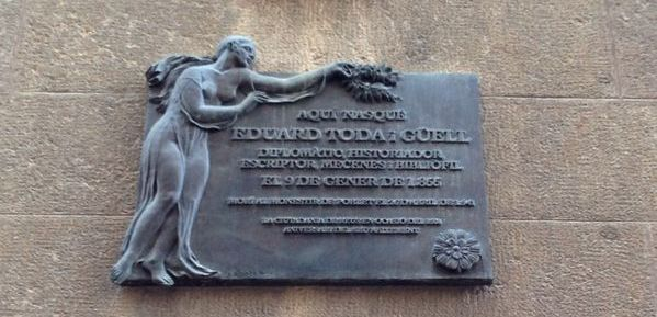 Casa Navàs, Reus.